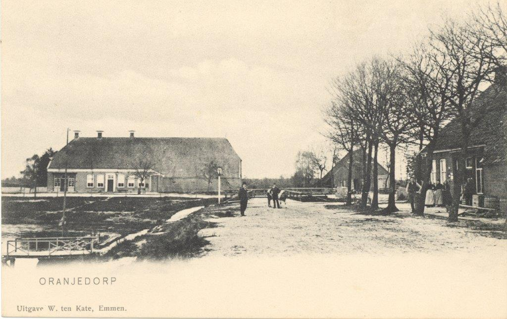 Boerderijen 1906